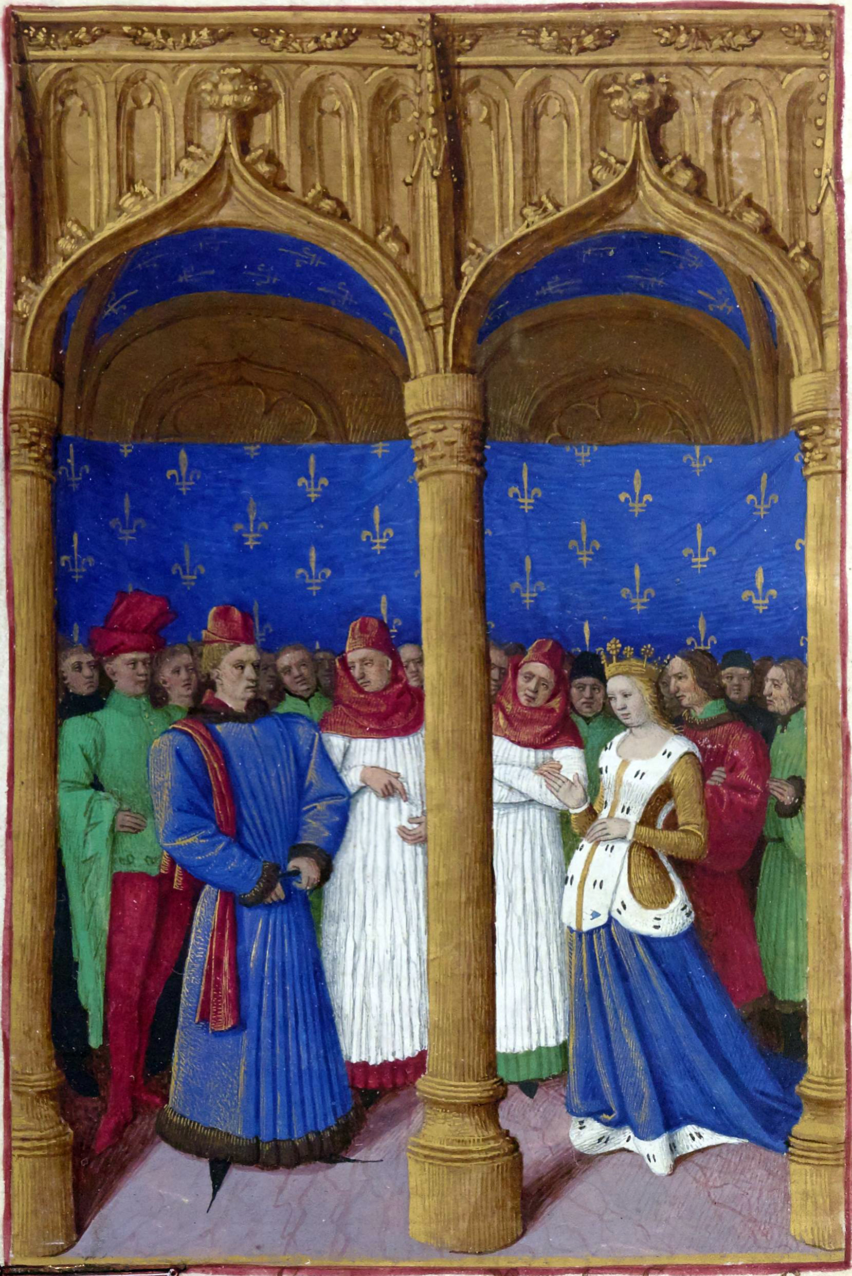 Jeanne dÉvreux et regent Philip